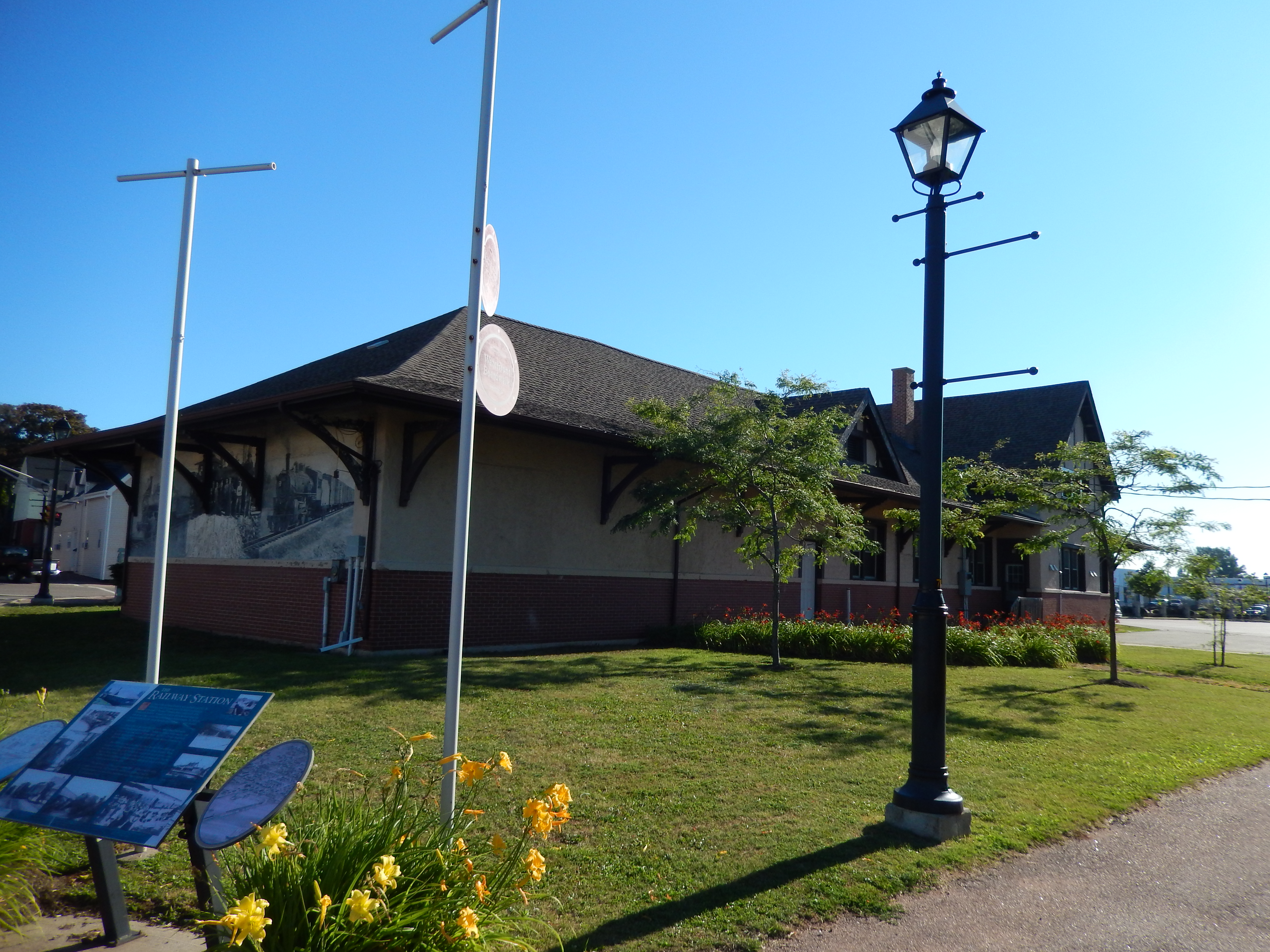 192 Water Street, 192 Water Street, Summerside (Canada). (Protection Registered Historic Place (Summerside). Voir la liste des lieux patrimoniaux de Summerside pour plus de détails).